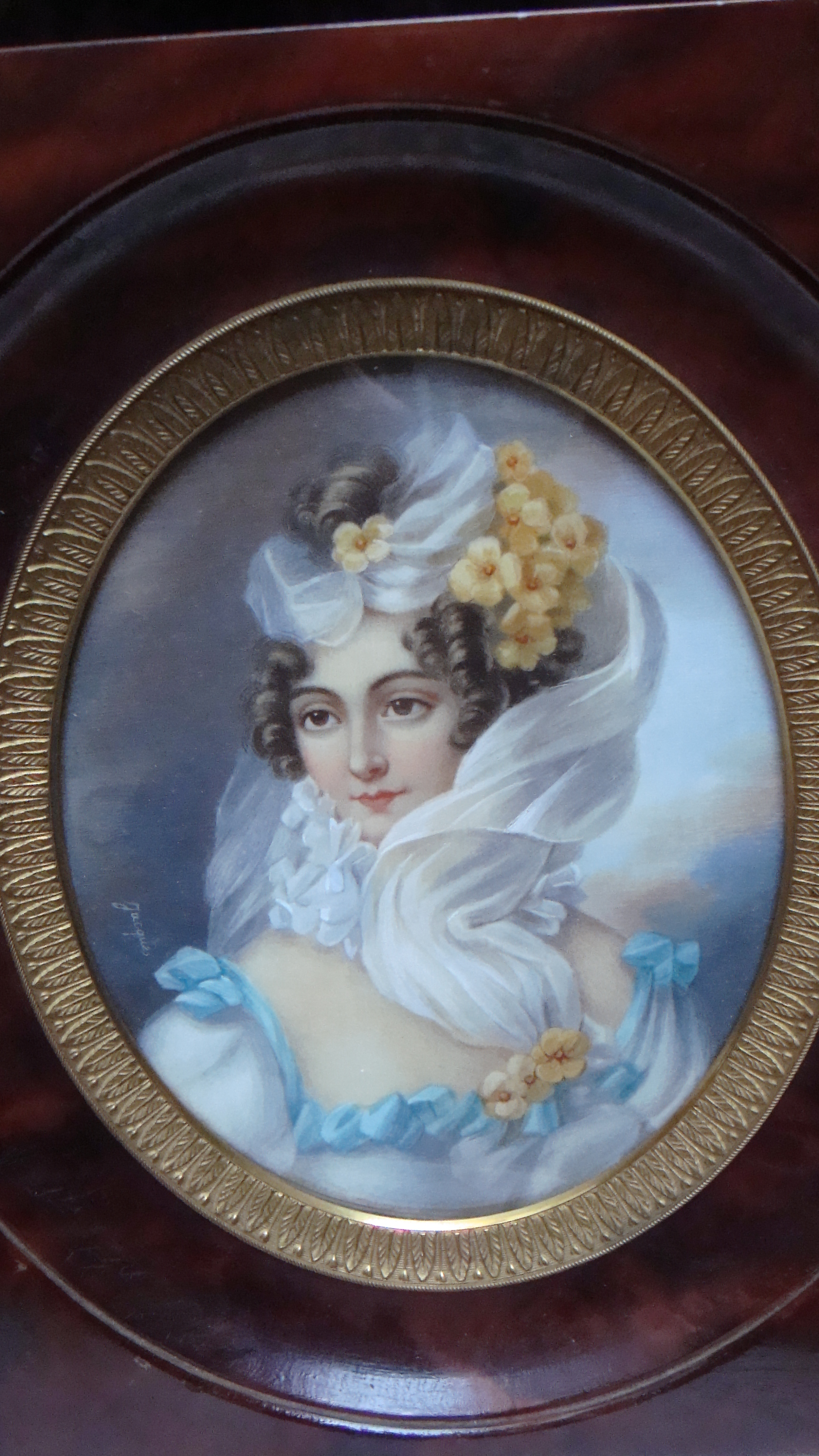 Es una miniatura, pintada sobre marfil, con marco de caoba, que lleva la firma "Jacques", por lo que se le atribuye su autoria a Jacques-Louis David, pintor del Imperio francés, y cuyas obras están en la colección del Louvre